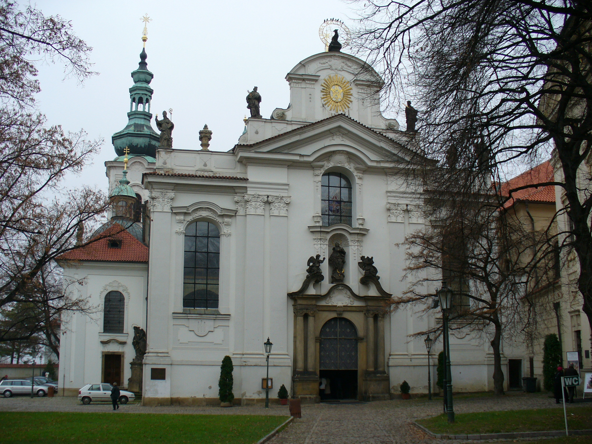 Prague - Prag - Praha - Praga. Strahov